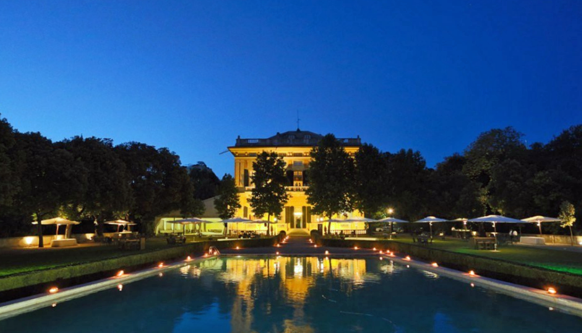 Villa Gropallo dello Zerbino Genova